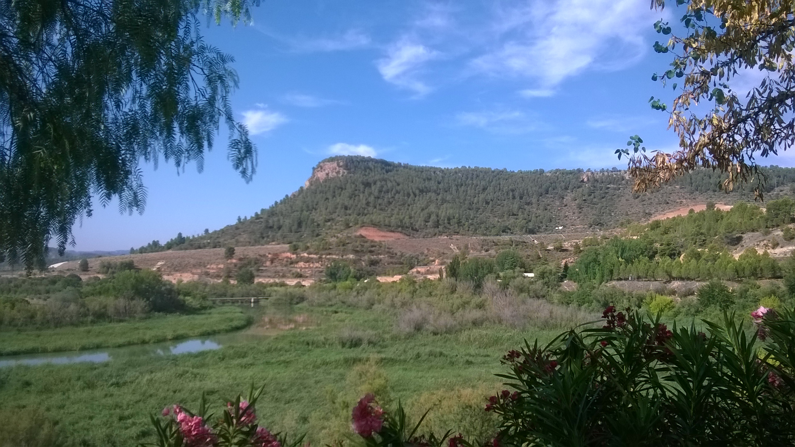 Vistas de Cofrentes tomadas durante el verano de 2014 por Isabel Valiente de la Granja.